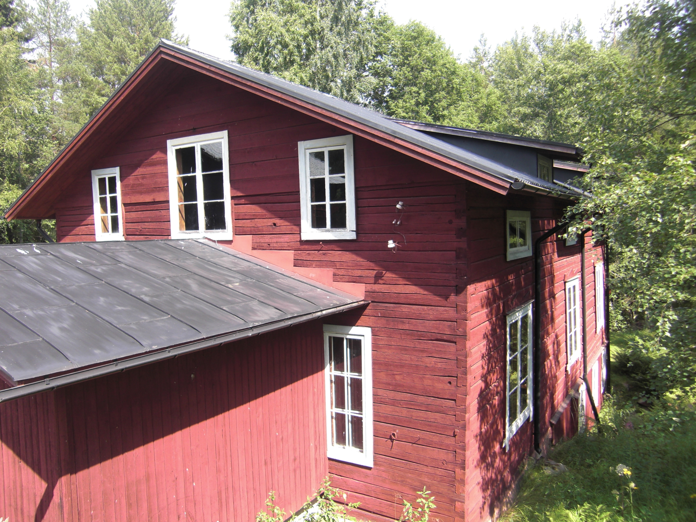 Byggnad